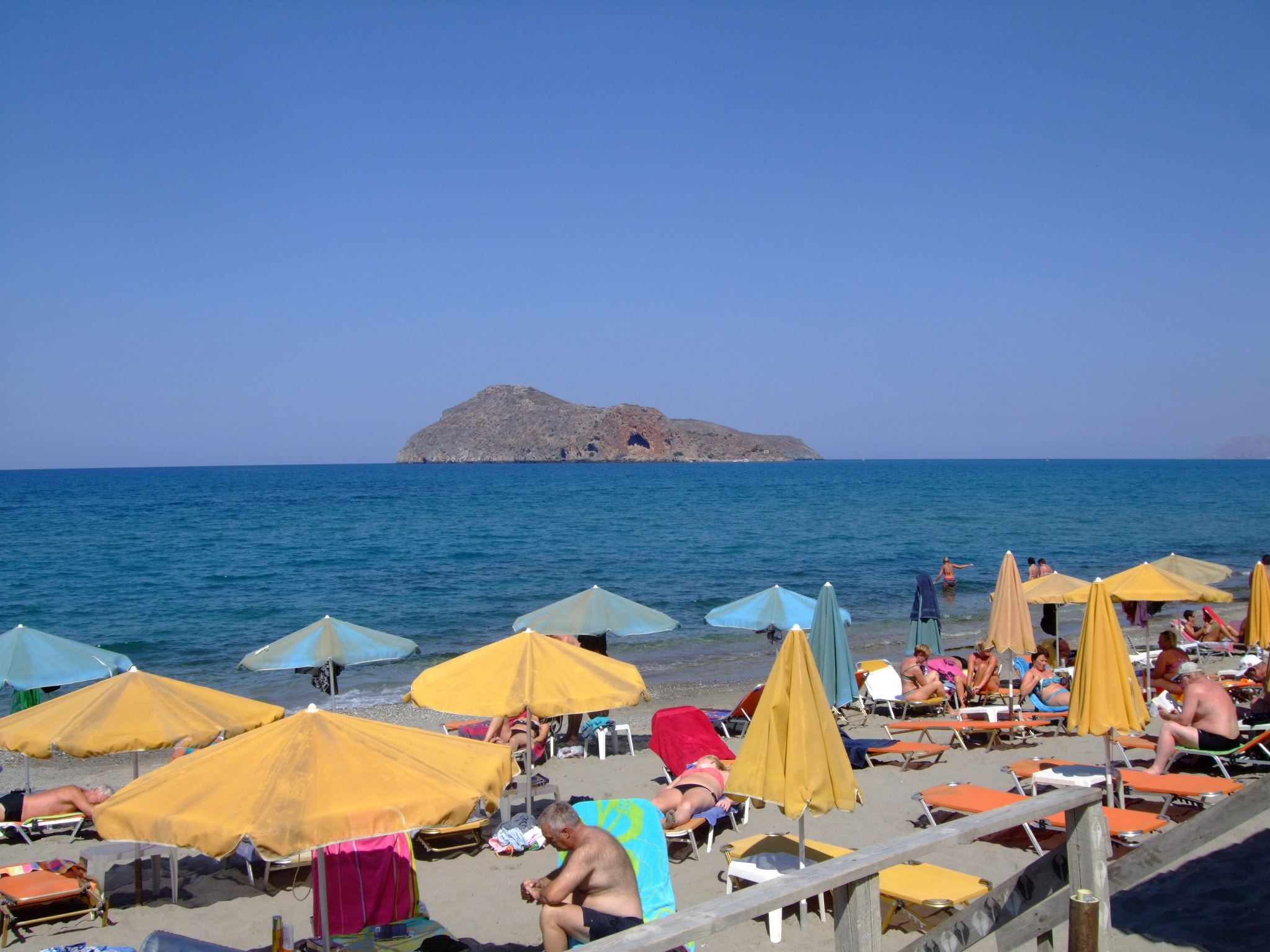 Agia Theodori, widok od strony Platanias.